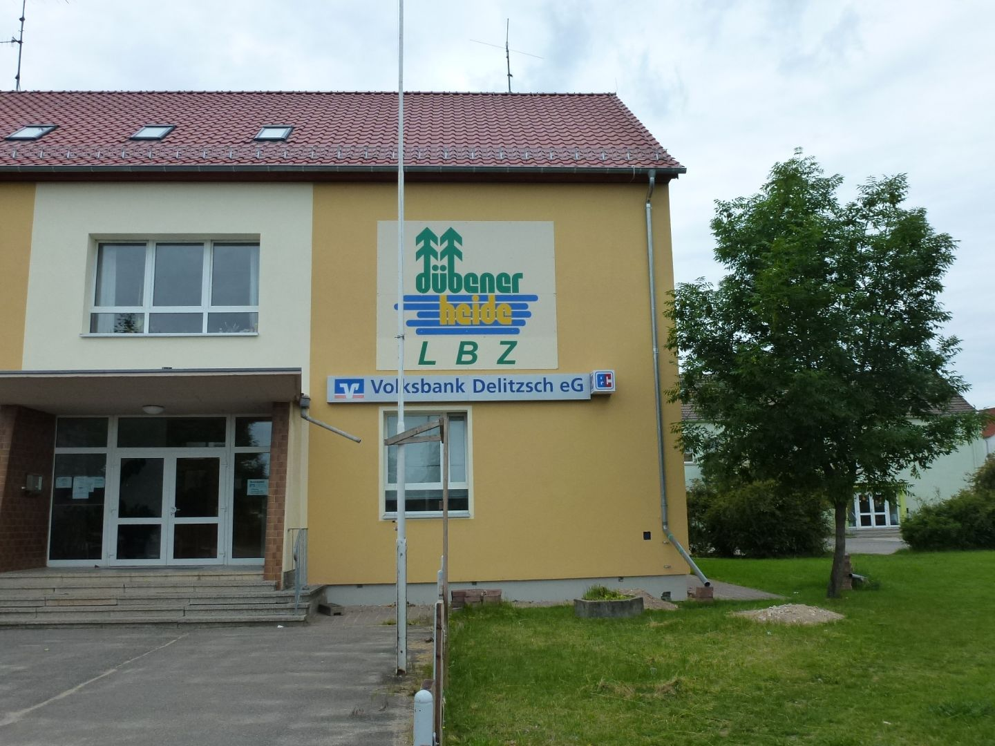 LBZ und Grundschule Laußig